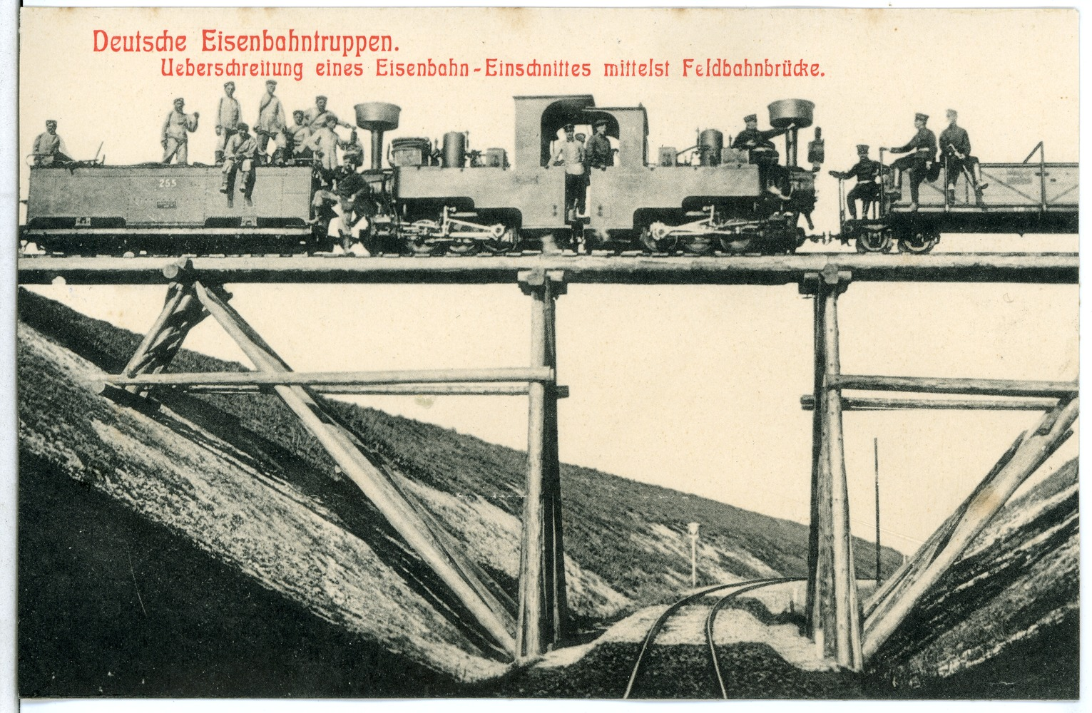 Löthain; Eisenbahntruppen Überschreiten mittels Feldbahnbrücke This postcard is from publisher Brück & Sohn in Meißen ( postcard has a unique number 11409 and is available in a higher resolution at the publisher. This images was uploaded in a cooperation project between Wikipedians and the publisher.